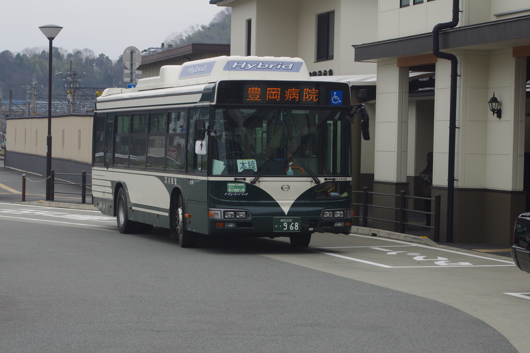 全但バスが導入したハイブリッドバス（日野・ブルーリボンシティ）。豊岡駅前にて撮影